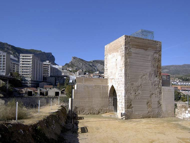 Porta d'ingrés a la torre Na Valora d'Alcoi